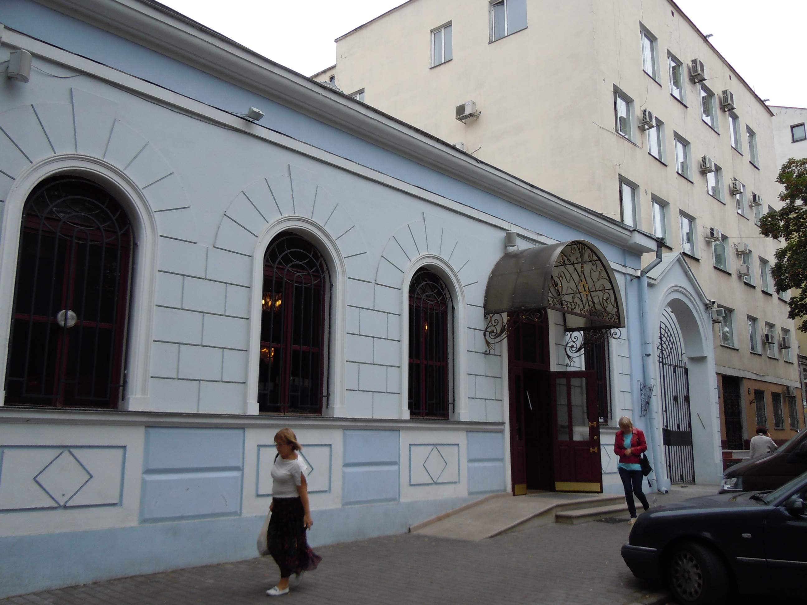 Синагога Бейт Хабат на вул. Осипова, Одеса